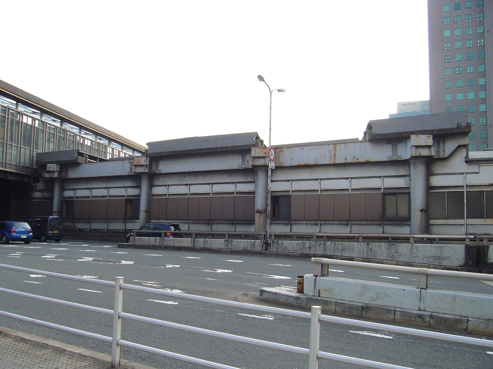 阪急新大阪連絡線の遺構 手前の道路は新御堂筋、その向こうが地下鉄新大阪駅。屋根上に乗っている台のようなものが新大阪連絡線の遺構。